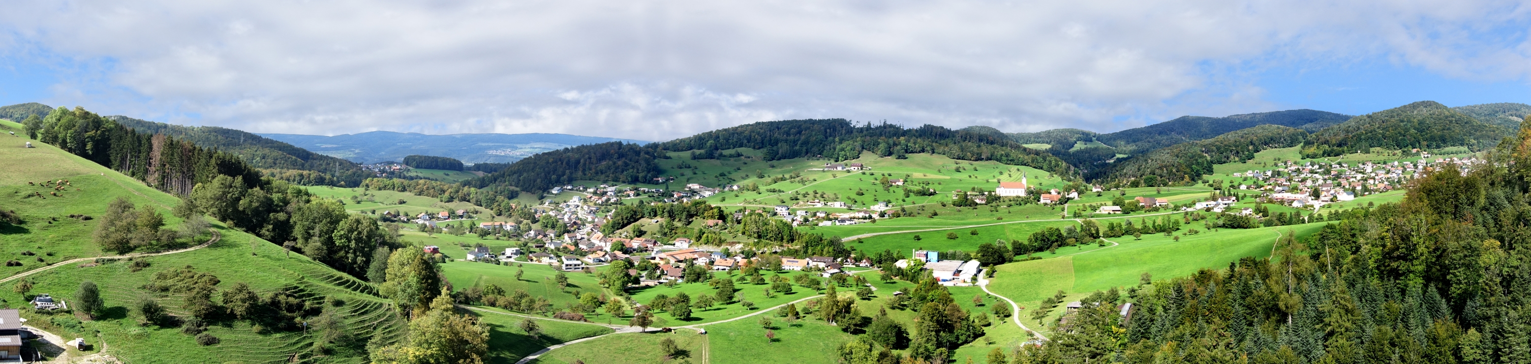 Blick von der Ruine Gilgenberg nach Zullwil, Pfarrkirche auf dem Weiler Oberkirch, Nunningen, Solothurner Faltenjuras, Schweiz